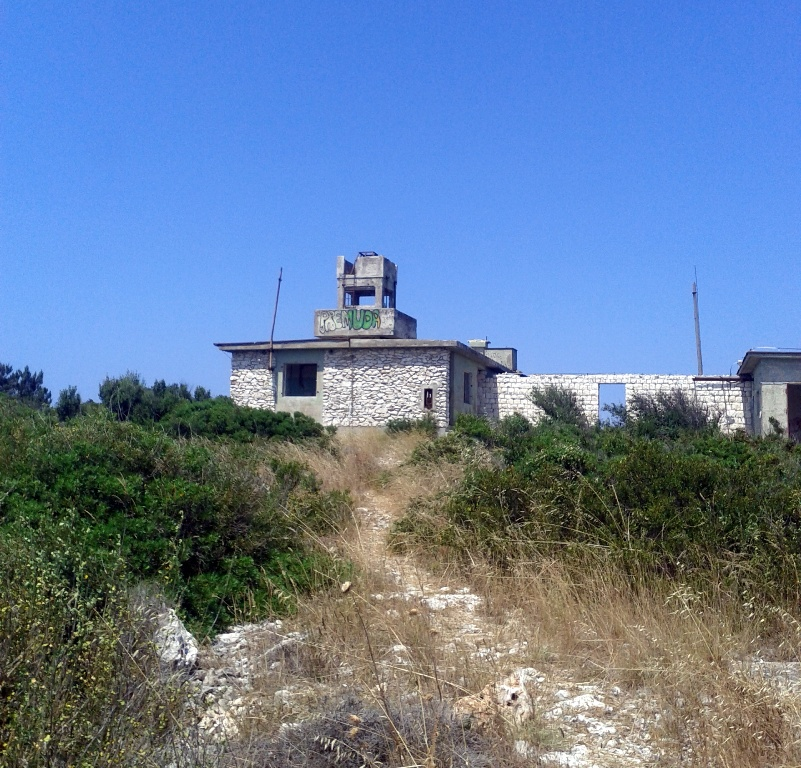 osmatračnica